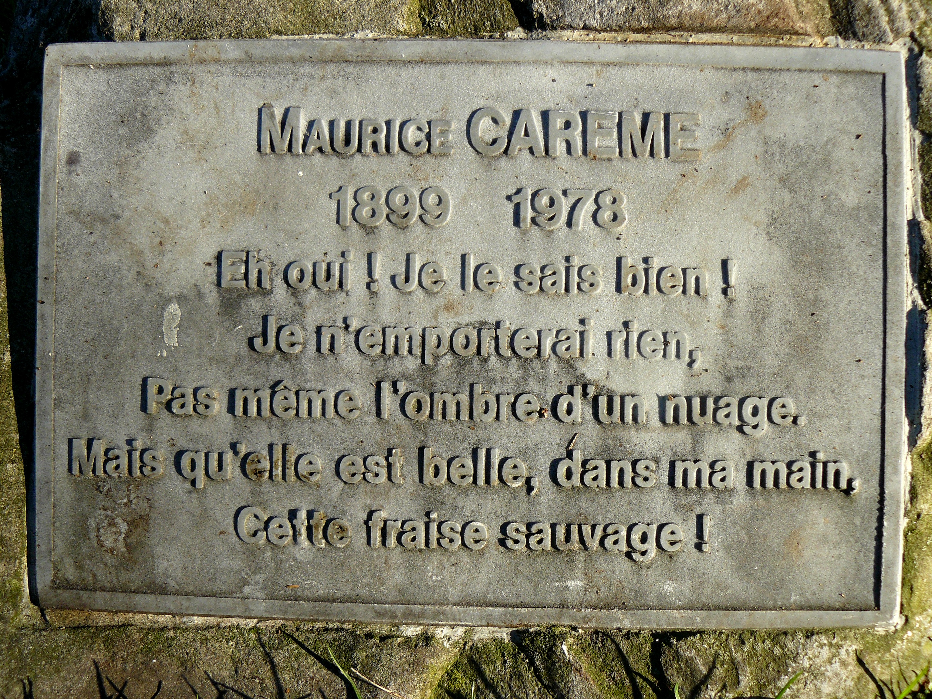 Vers de Maurice Carême, poète belge, dans le Jardin des Poètes à Paris, XVIe arrondissement.